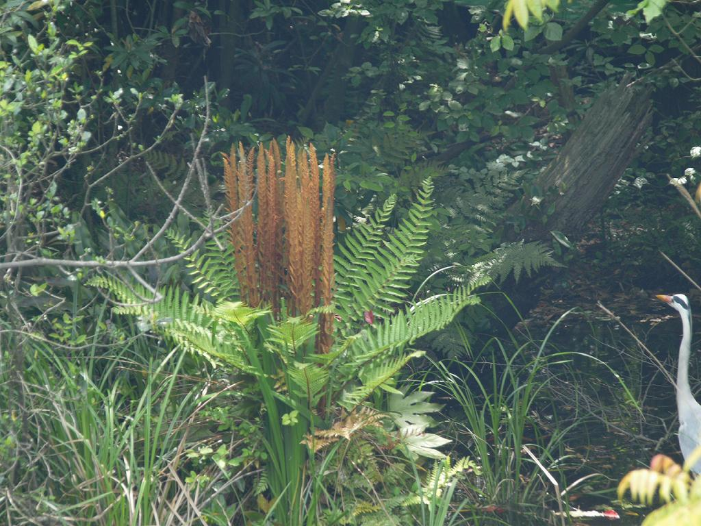 2009/05/03: singu:ukisianomori 浮島の森 和歌山県新宮市：Shingu City, Wakayama Pref. Japan